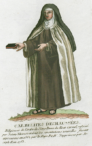 Collection de costumes de tous les ordres monastiques, supprimés à differentes époques, dans la ci-devant Belgique, Bruxelles, Philippe Joseph Maillart et sœur, 1811